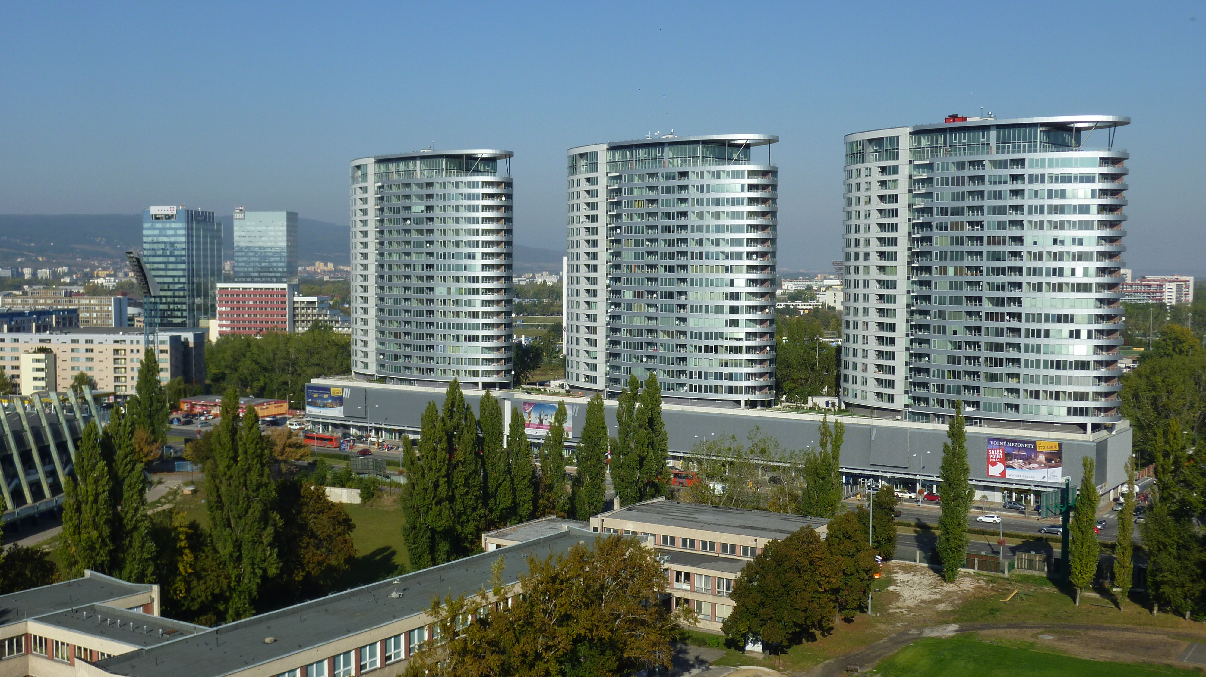 TRI VEŽE Z DOUBLE TREE BY HILTON